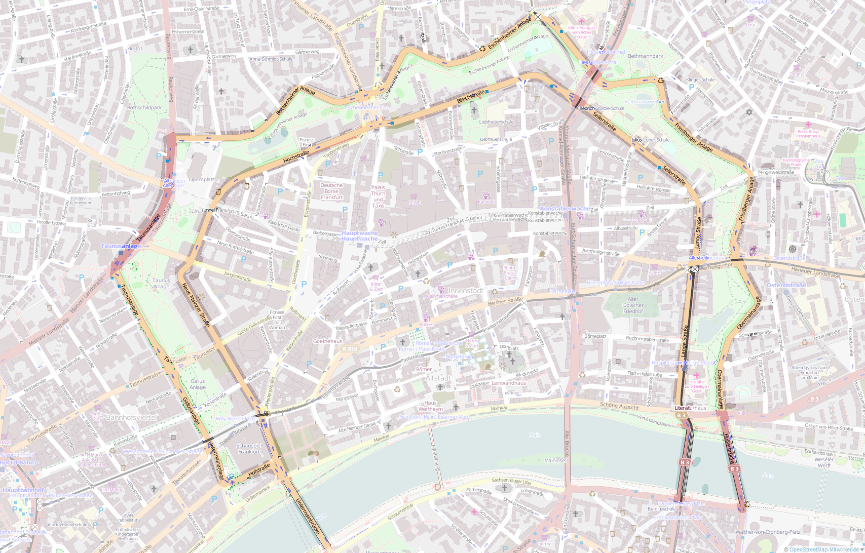 Hervorhebung Anlagenring Frankfurt